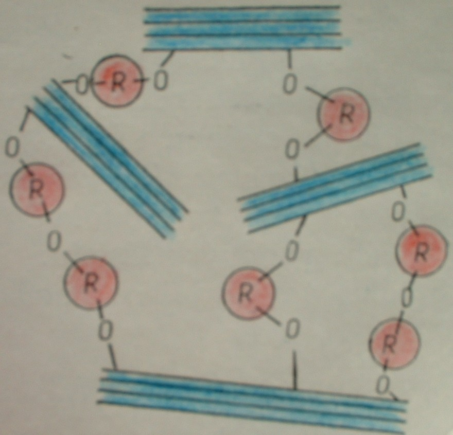 Schema: Vernetzung von Molekülen